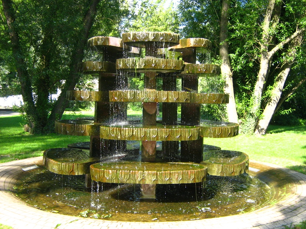 sculpture/fountain Freundschaftsbrunnen by Wenske, Dübel, Bachman